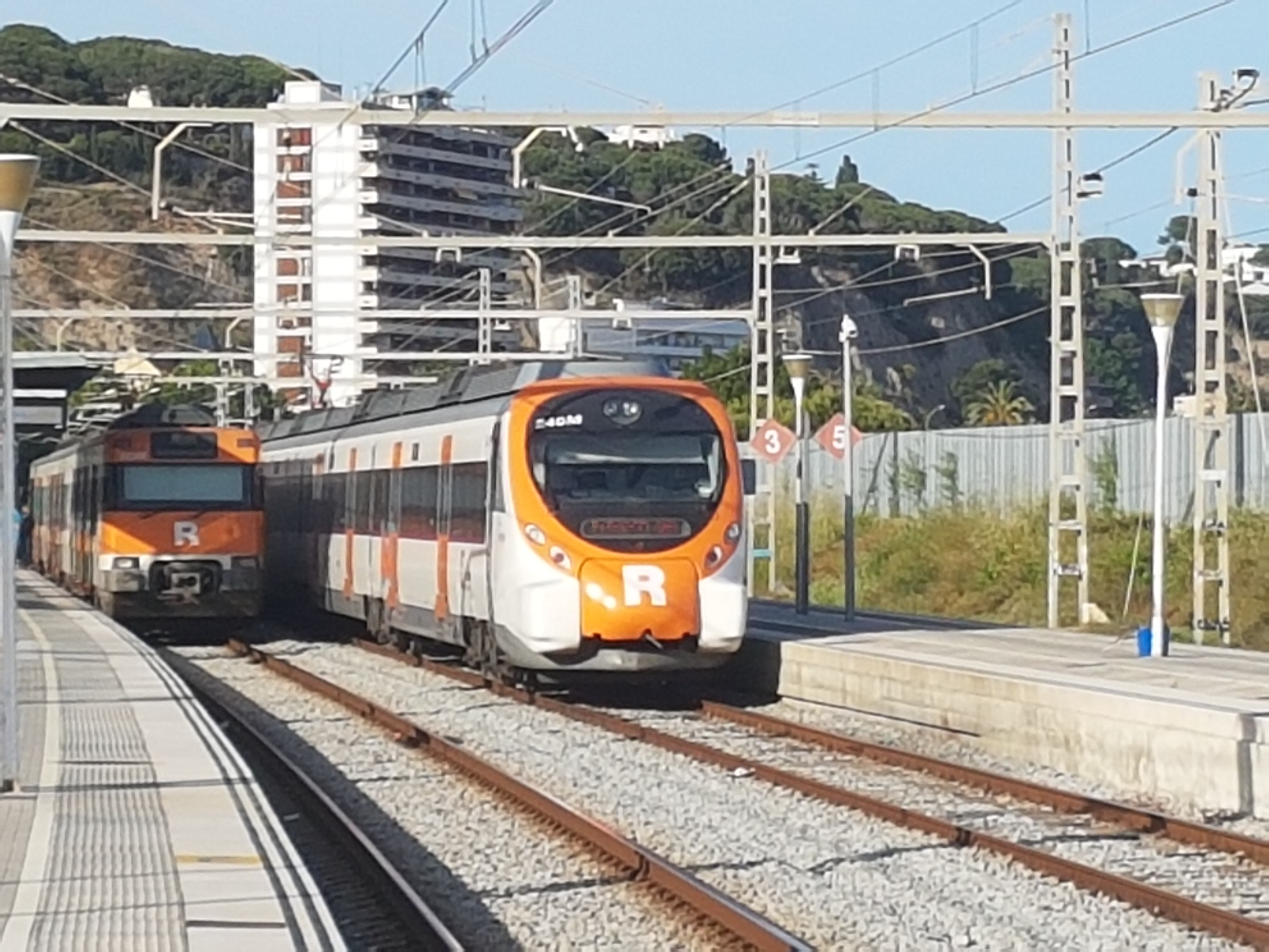 Tren de la sèrie 447 amb servei R1 Calella i tren Civia amb servei R1 l'Hospitalet